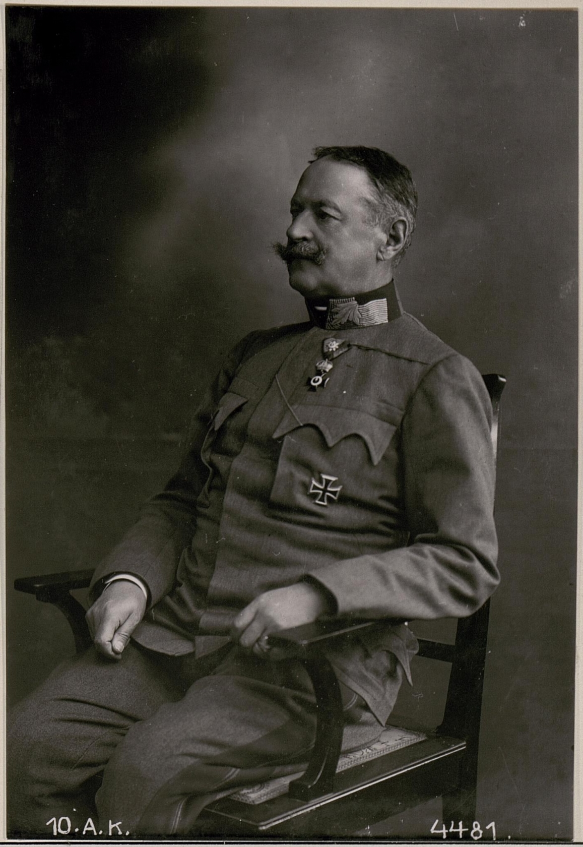 Exzellenz Feldmarschall Krobatin